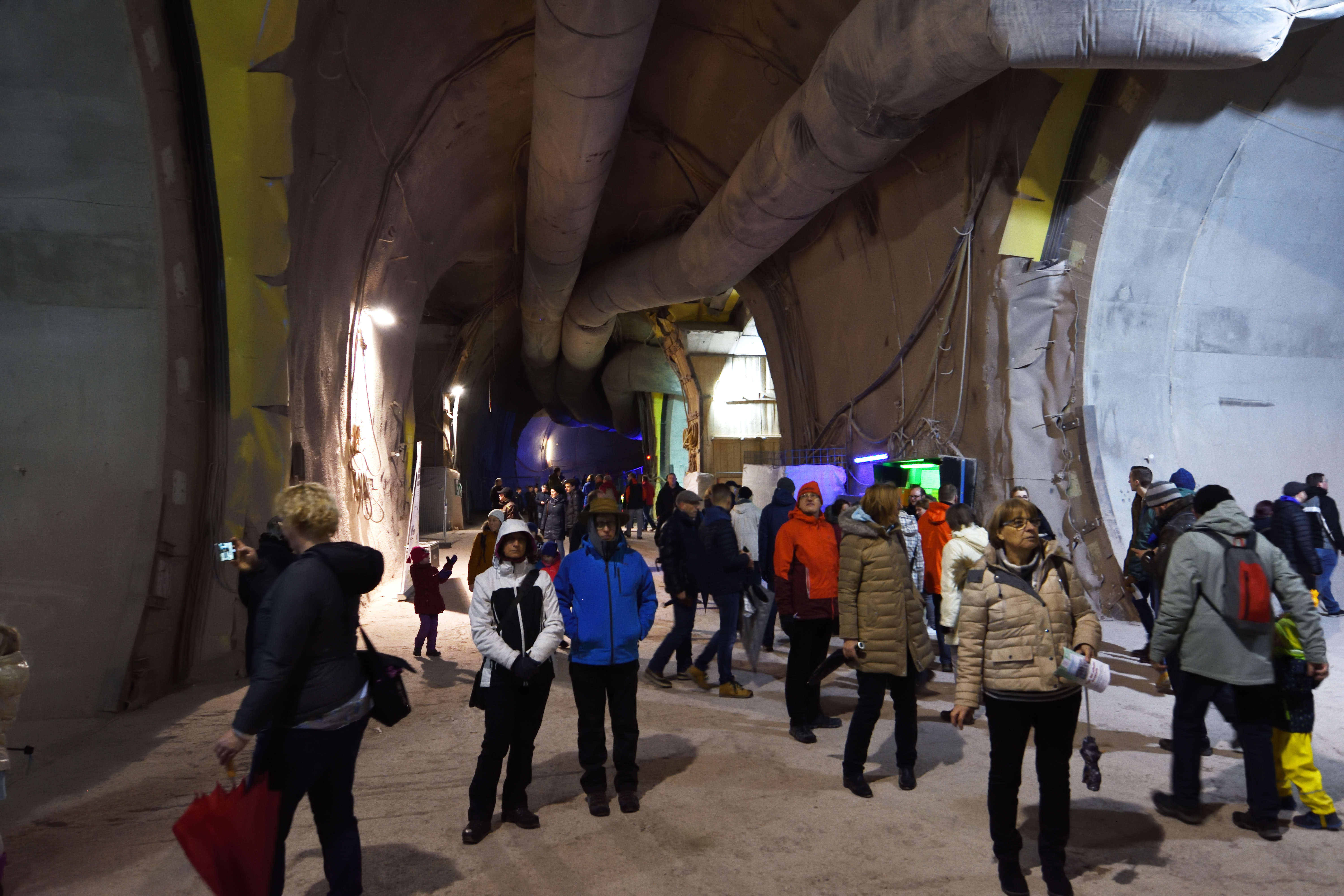 Südkopf des Stuttgarter Hauptbahnhofs, auf Höhe der Rettungszufahrt Süd, am Übergang vom Hauptbahnhof (rechts) zum Fildertunnel und Tunnel Obertürkheim (jeweils links).